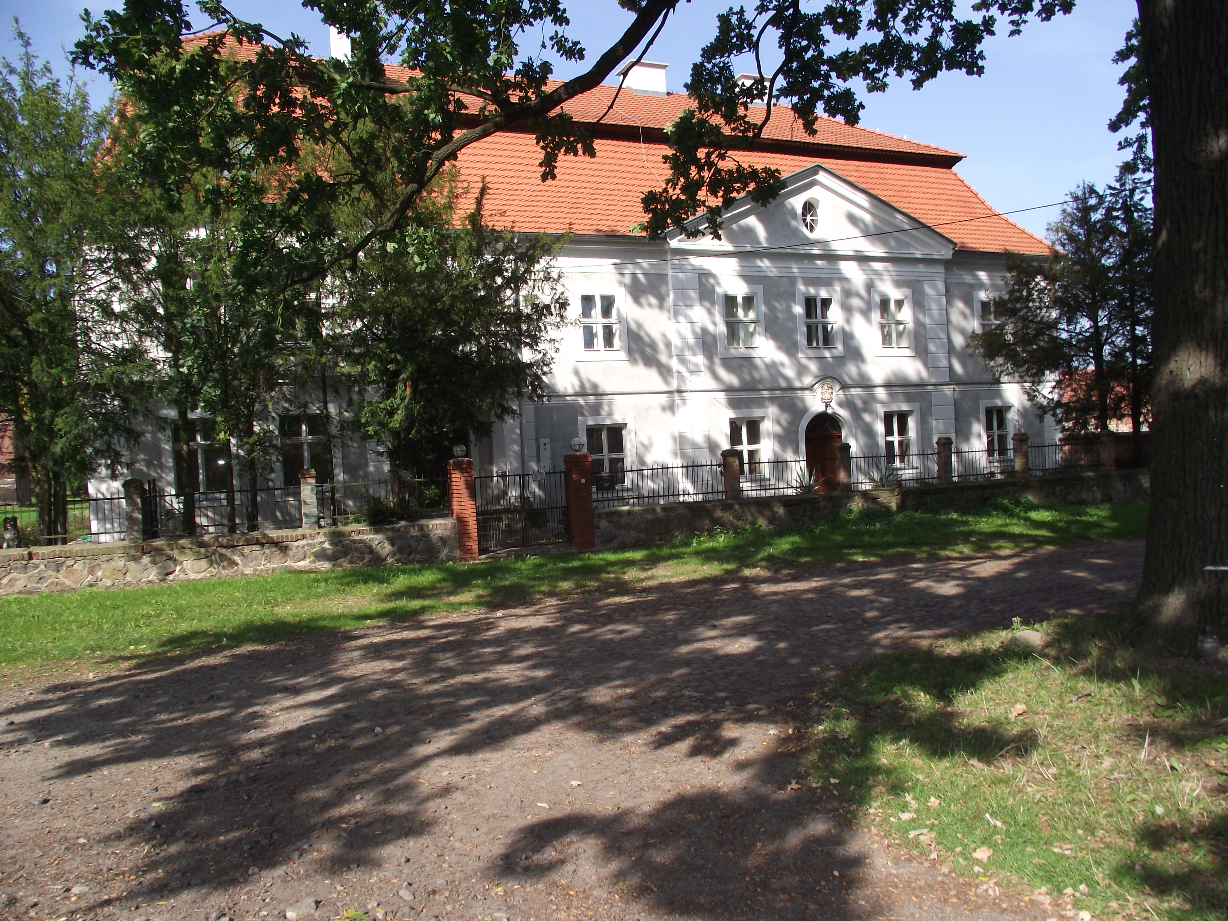 Dwór w Jabłonowie 09.1964.